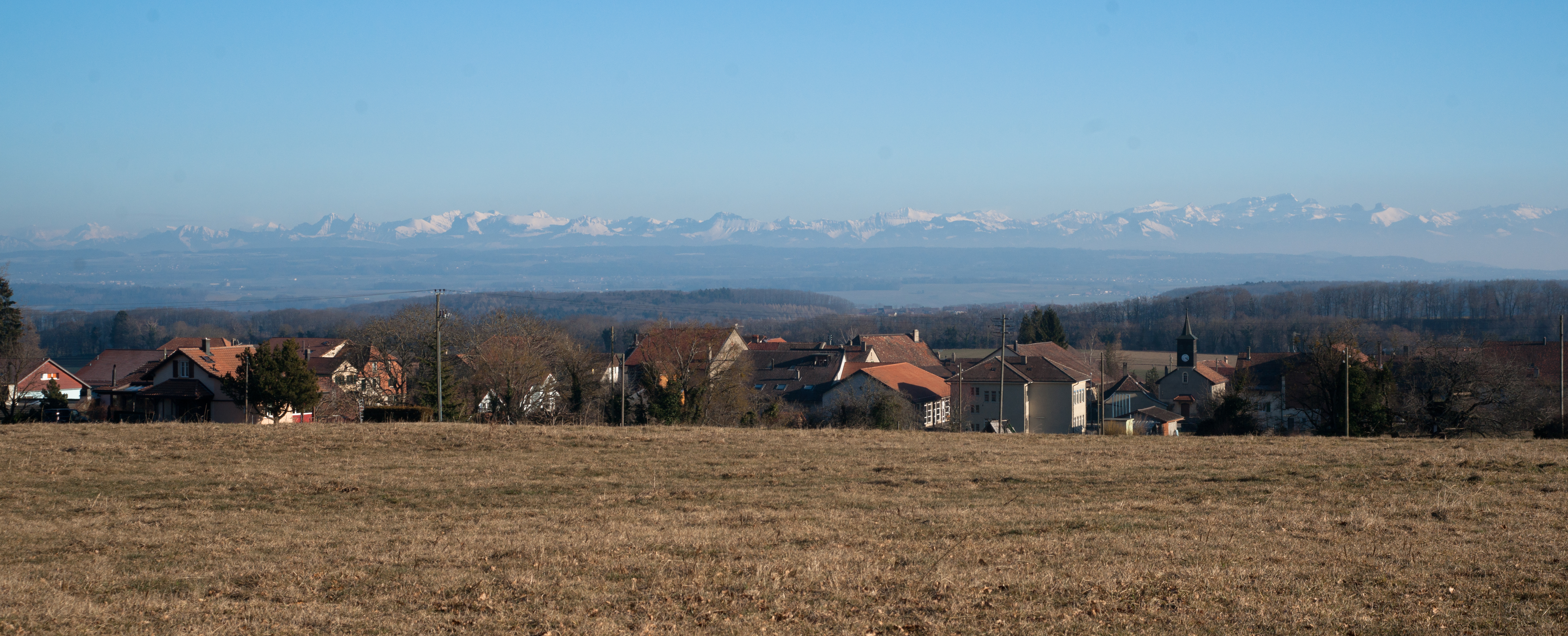 Commune de Moiry, canton de Vaud, Suisse. Les Alpes en arrière plan.